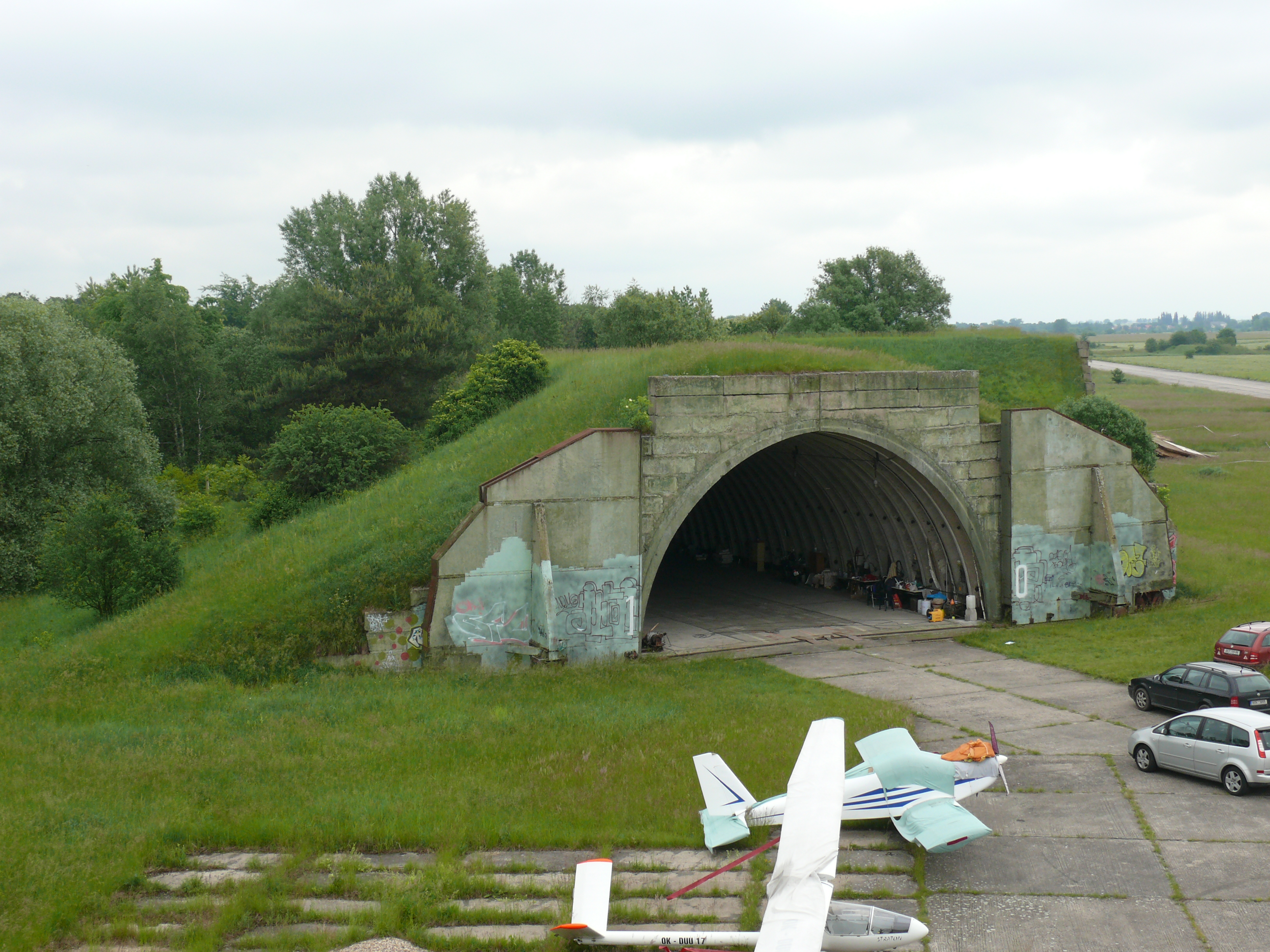 Boží Dar, obec Milovice - hangár č. 12 (na vratech č. 10)